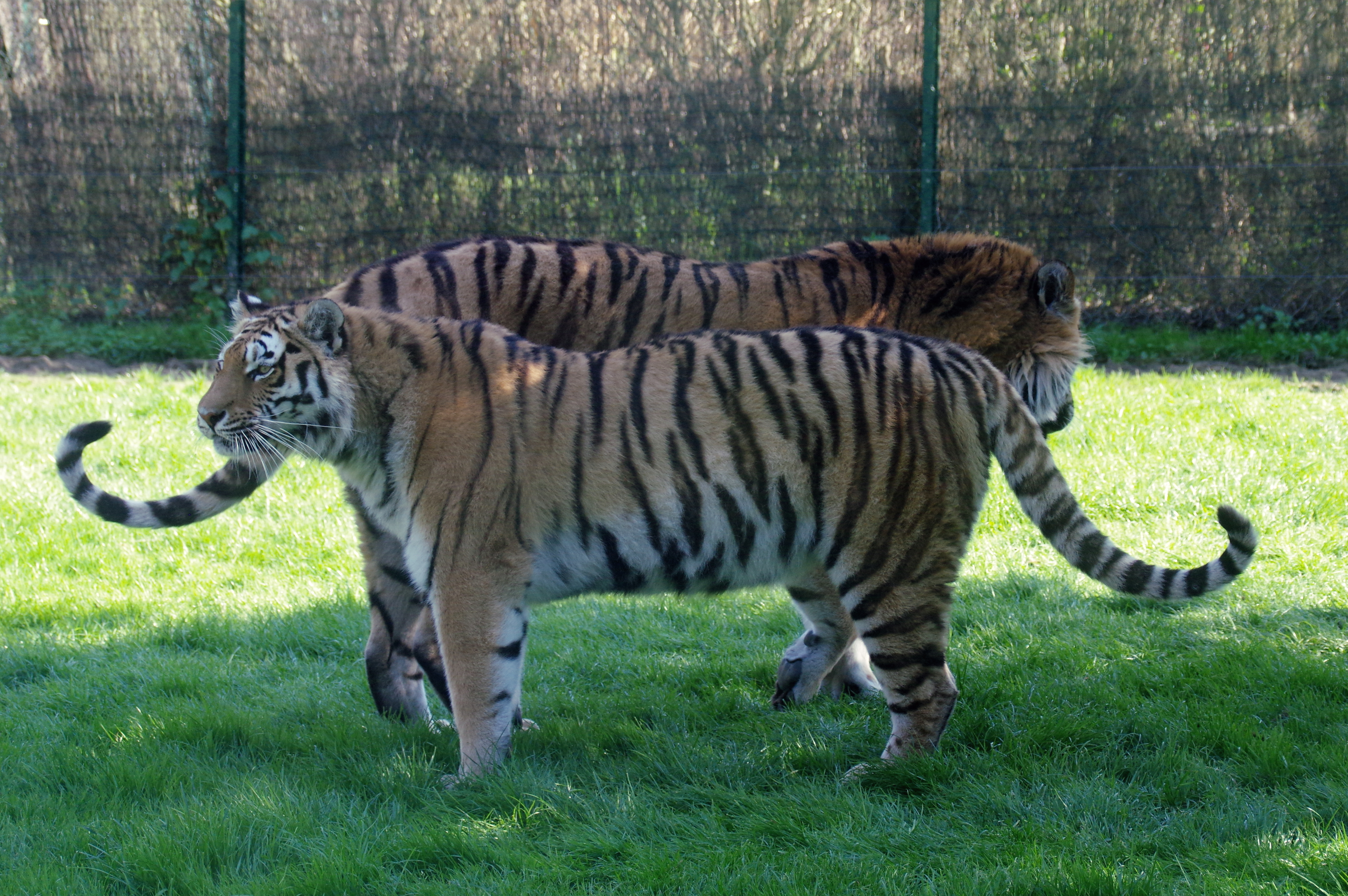 Tigres de Sibérie (Panthera tigris altaica) au Zoo de la Bourbansais.